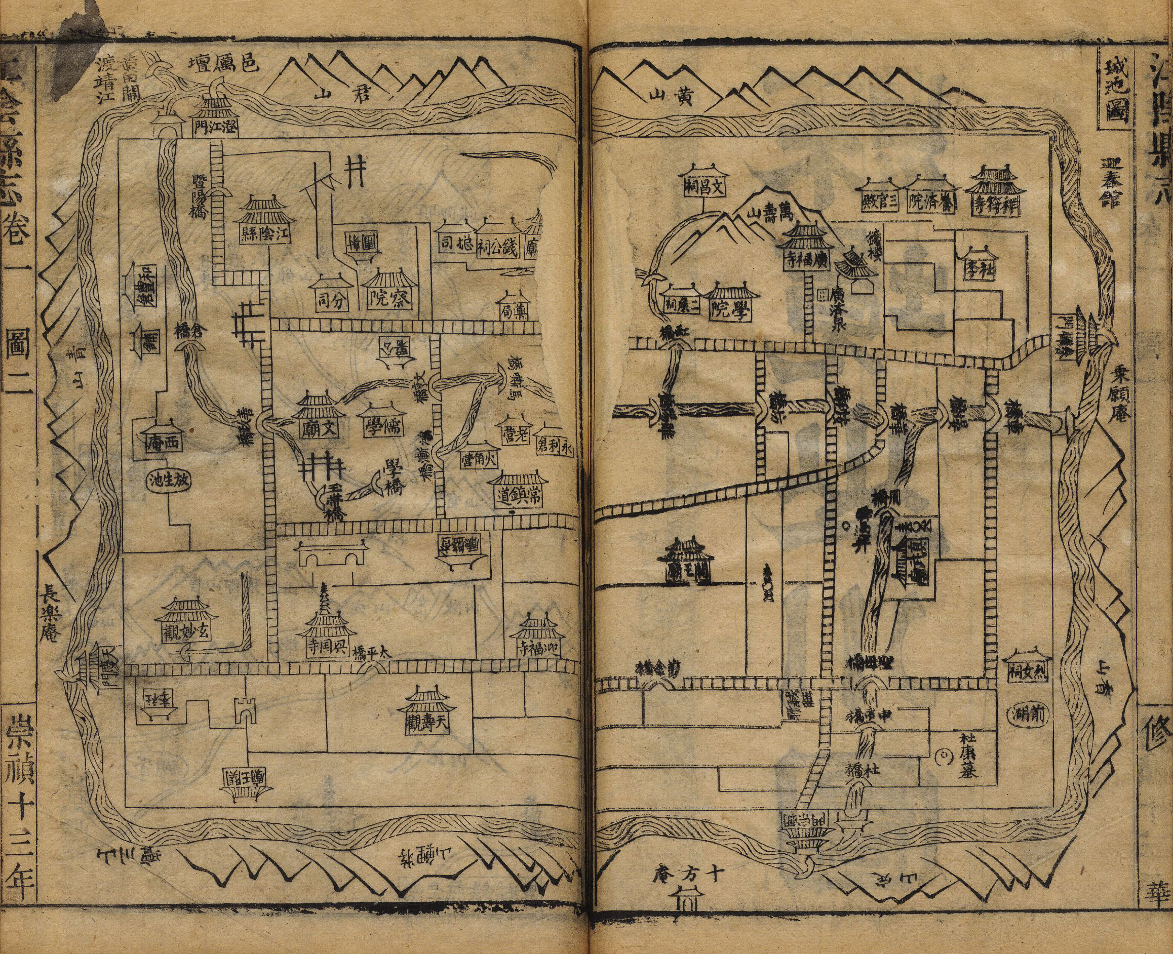 明崇祯十三年（1640）《崇祯江阴县志》城池图。